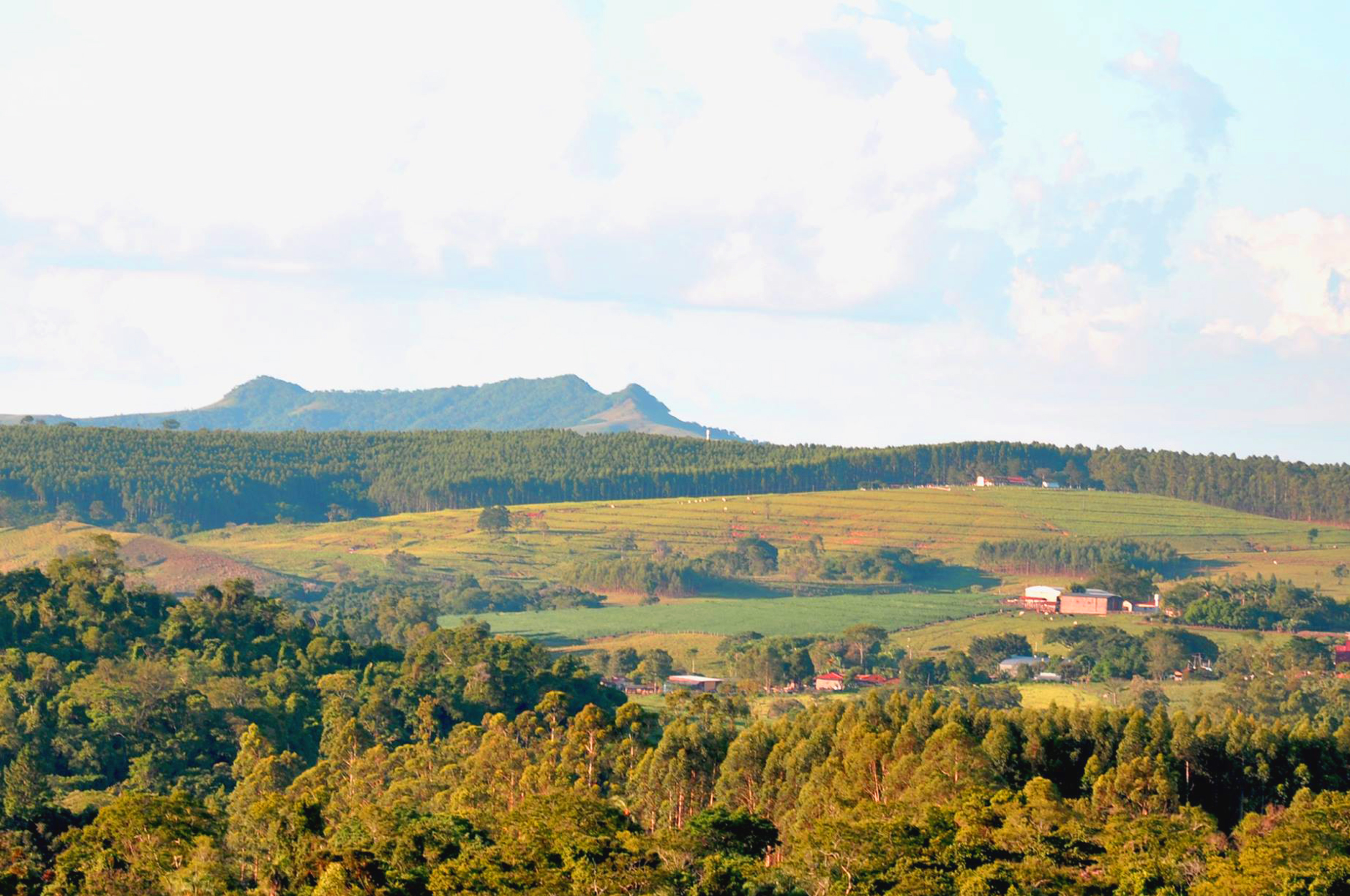 Local visitado por turistas que além de desfrutar das paisagens deslumbrantes ainda pode praticar rapel